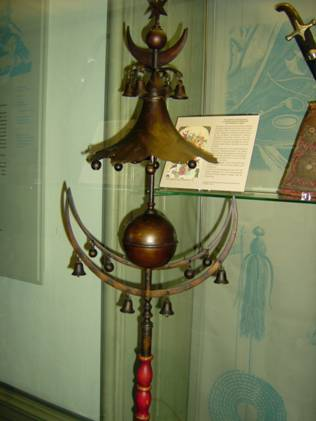 Osmanischer Schellenbaum aus der Beute des Türkenlouis im Wehrgeschichtlichen Museum (WGM) in Rastatt